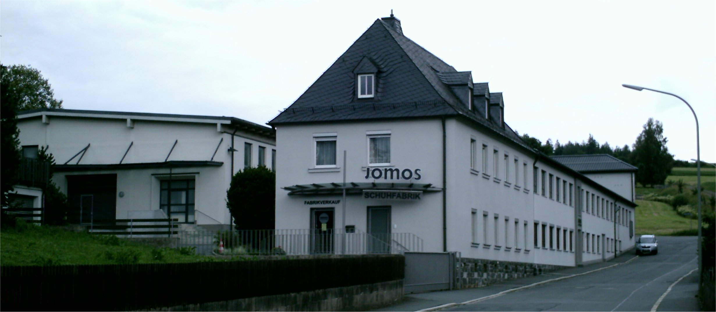 Gebäude der Firma Jomos (Hersteller von Schuhen) in Selbitz/Oberfranken in der Garlesstraße